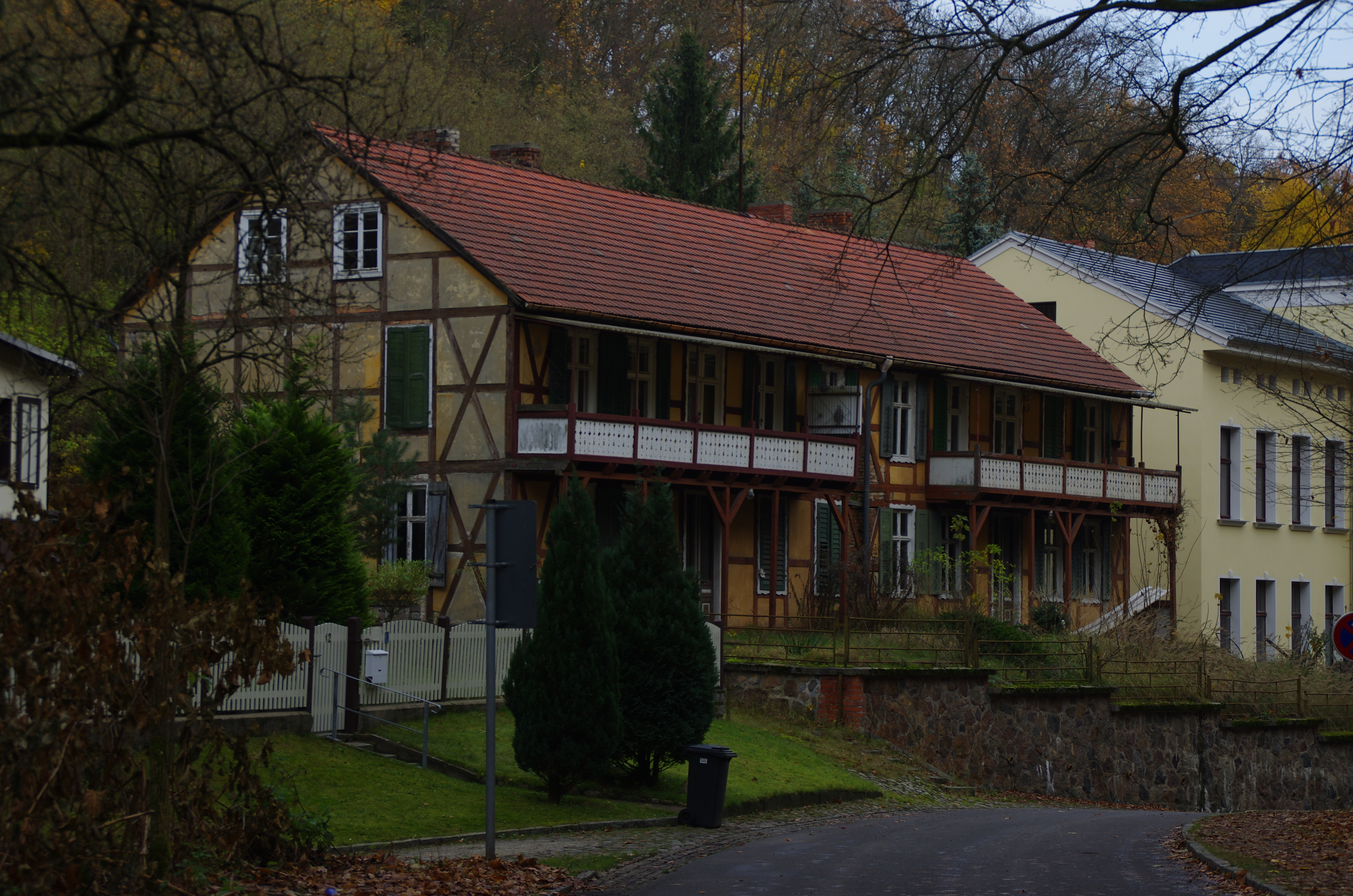 Bad Freienwalde (Oder). Das Haus in der Straße Heilige Hallen 10 steht unter Denkmalschutz.